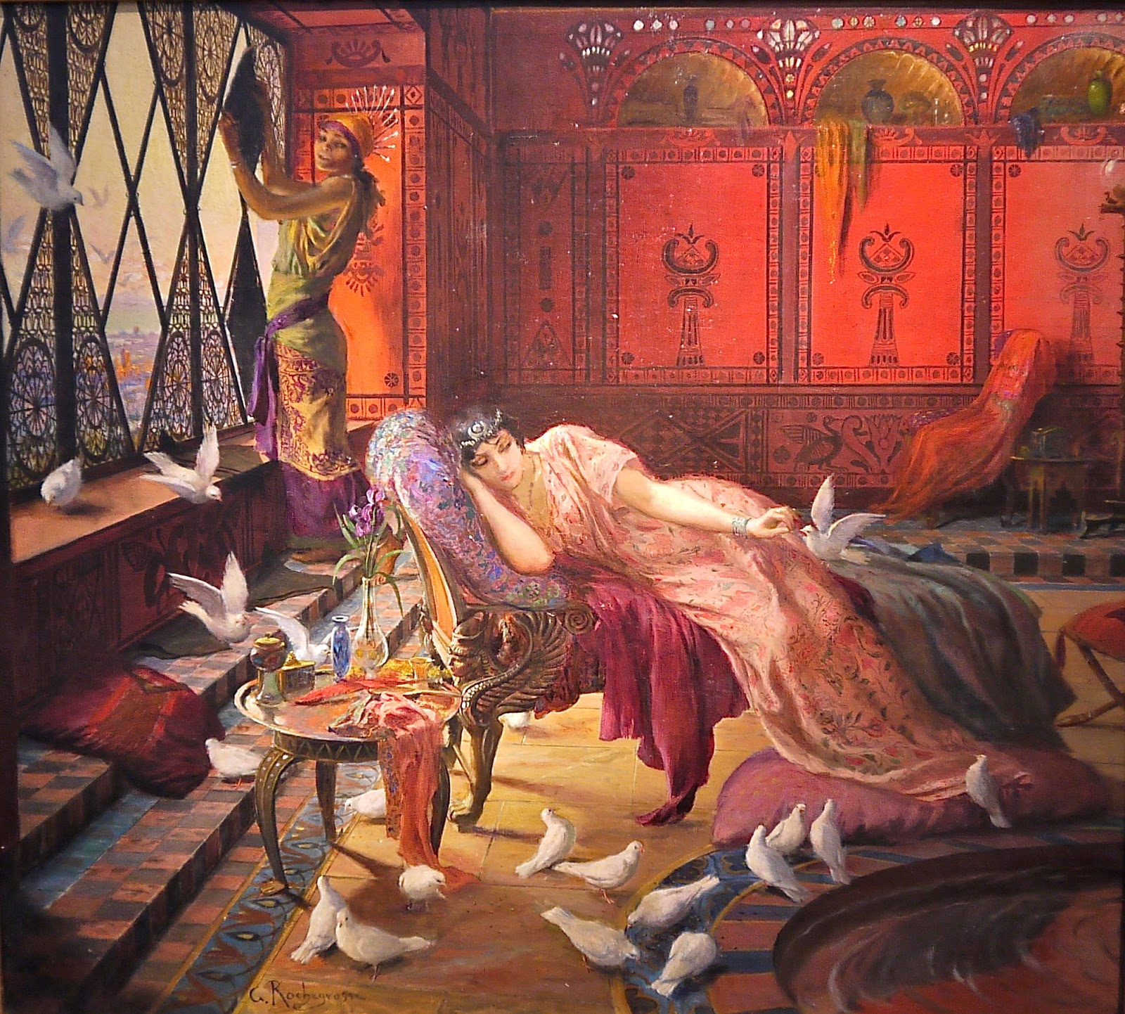 Toile orientaliste, Dreux, musée d’art et d’histoire Marcel-Dessal.